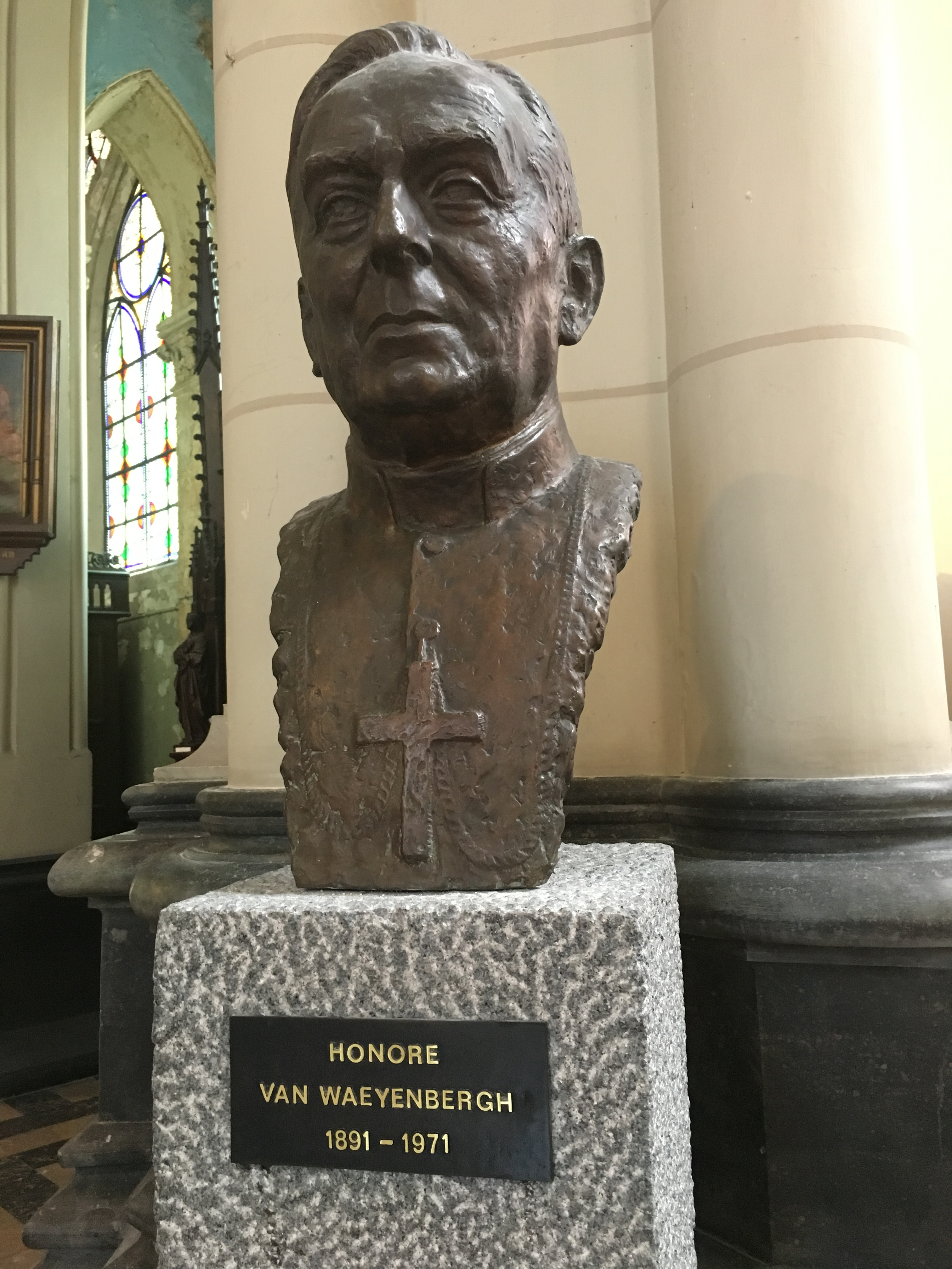 Chiesa di Nostra Signora di Laeken